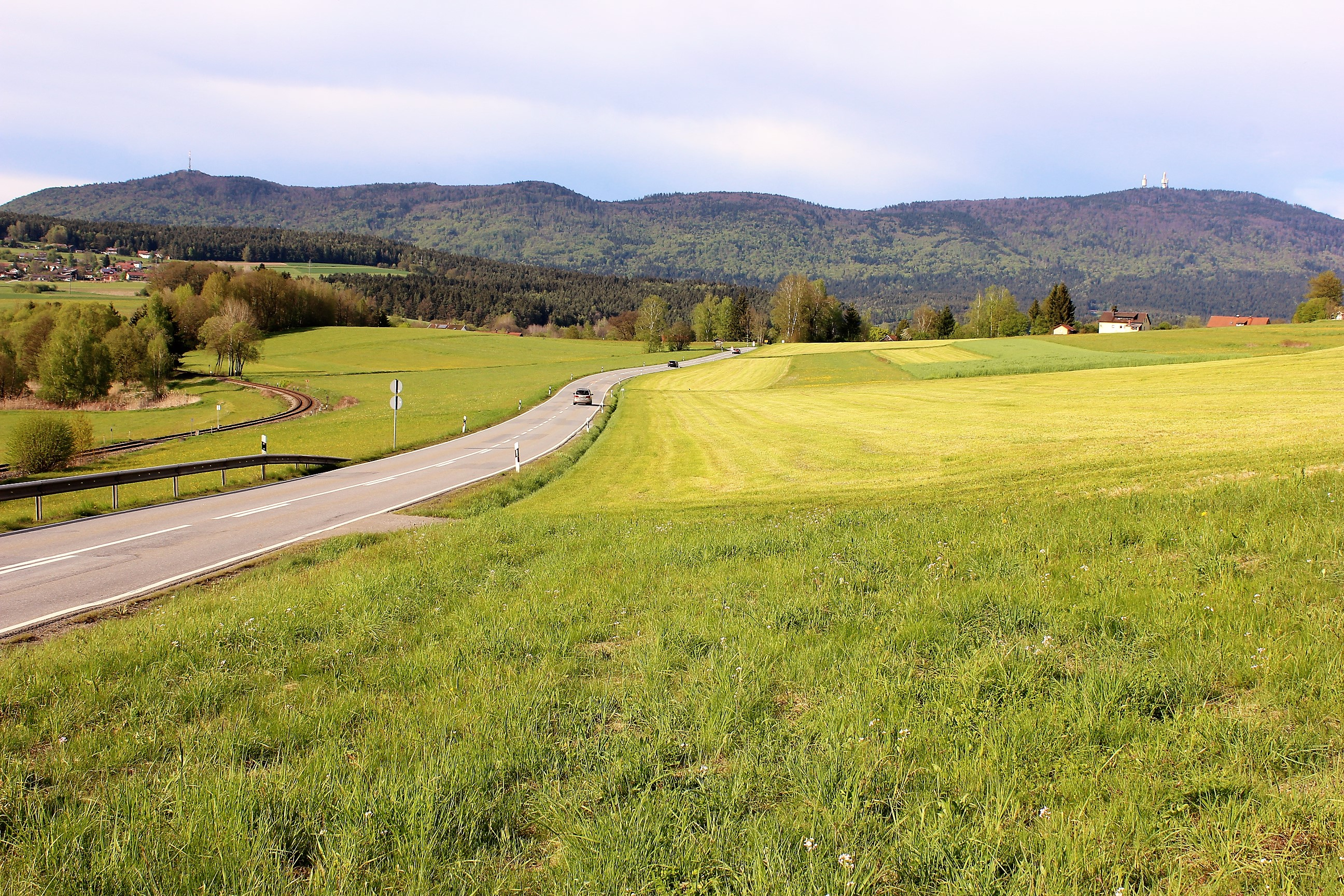 Blick auf den Bergrücken des Hohen Bogen von Grafenwiesen aus. Links im Bild ist die Bahnlinie zu sehen, die von Cham nach Lam führt.